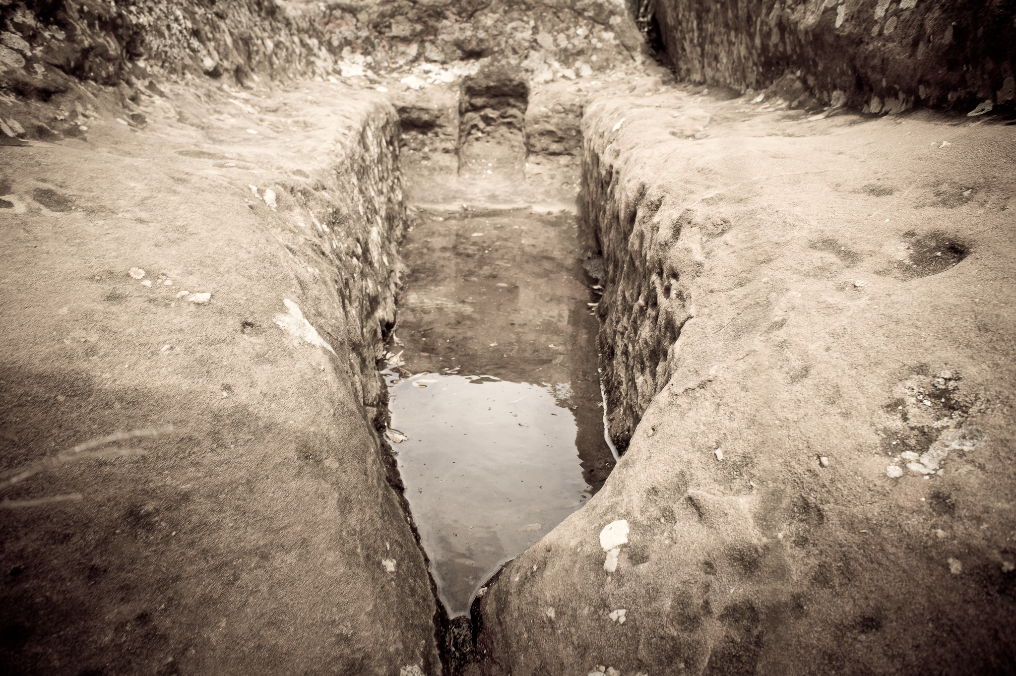 Tomba antropomorfa al voltant de l'ermita del castell d'Eramprunyà, Gavà, Baix Llobregat.